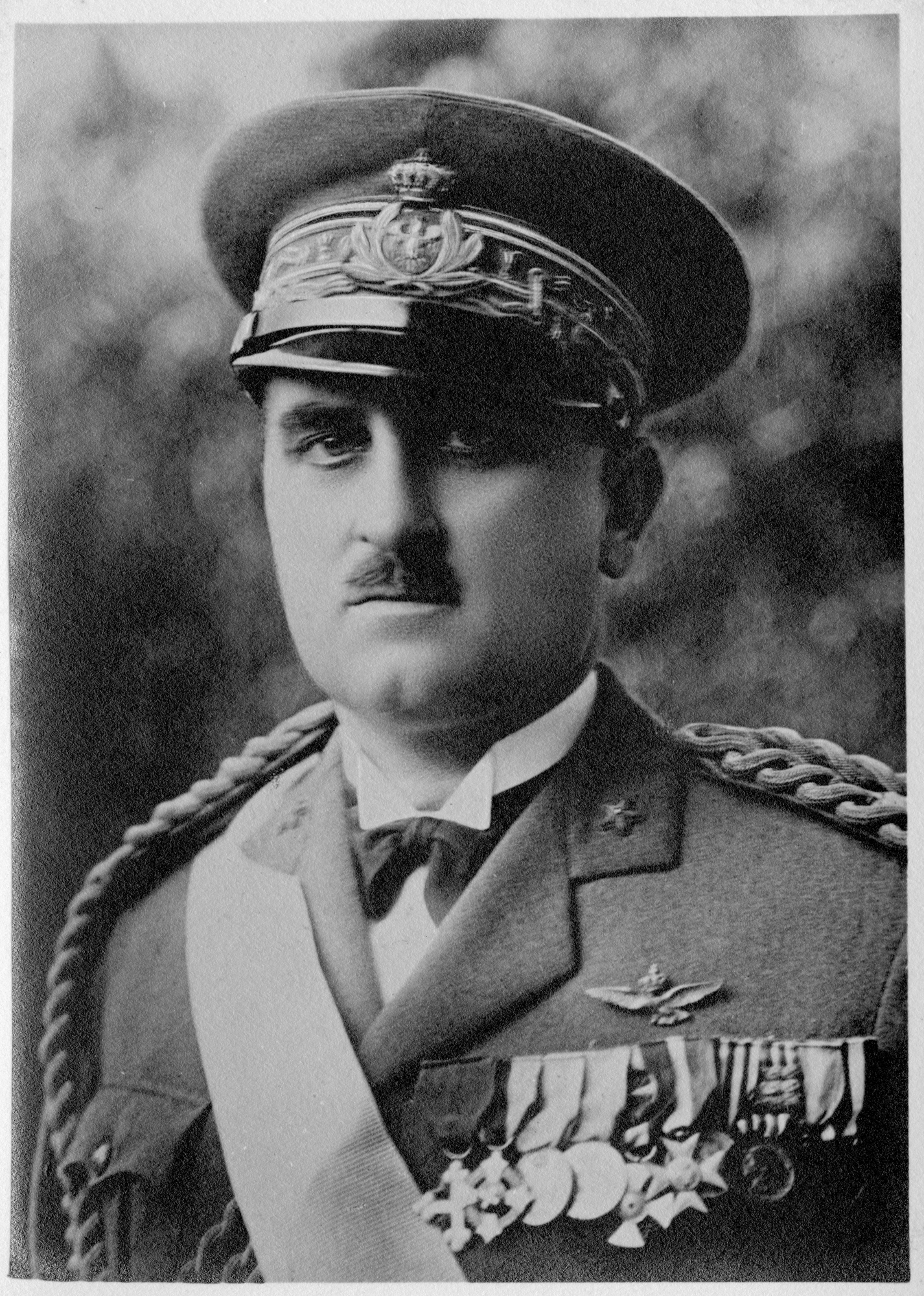 Ritratto del generale di squadra aerea Giuseppe Valle